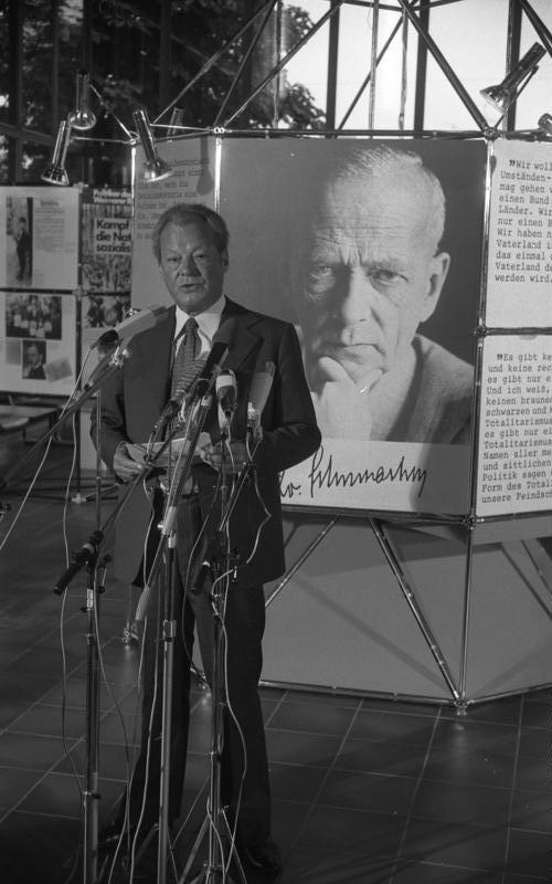 SPD-Vorsitzender Willy Brandt eröffnet die Kurt-Schumacher-Gedächtnis-Ausstellung im Erich-Ollenhauer-Haus, Bonn